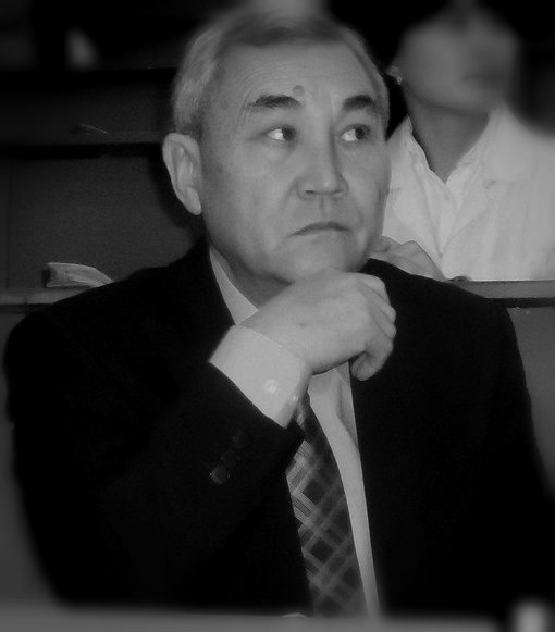 Қуандықов Есенгелді Өсербайұлы